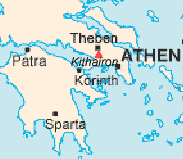 Situación de la cordillera del Citerón (Grecia).